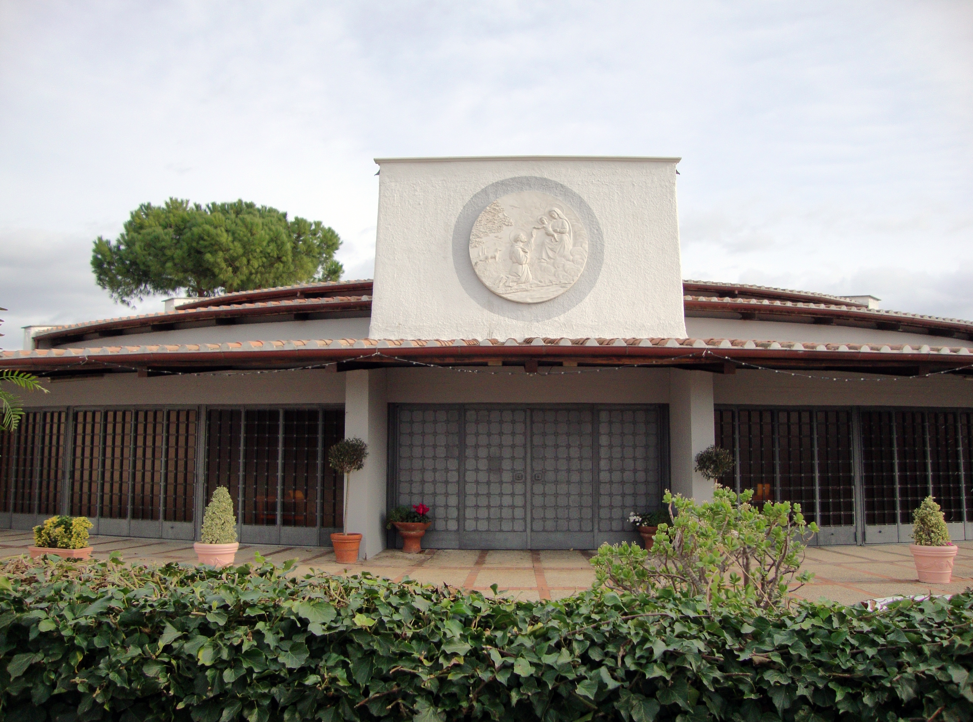 Facciata chiesa S. Francesco d'Assisi